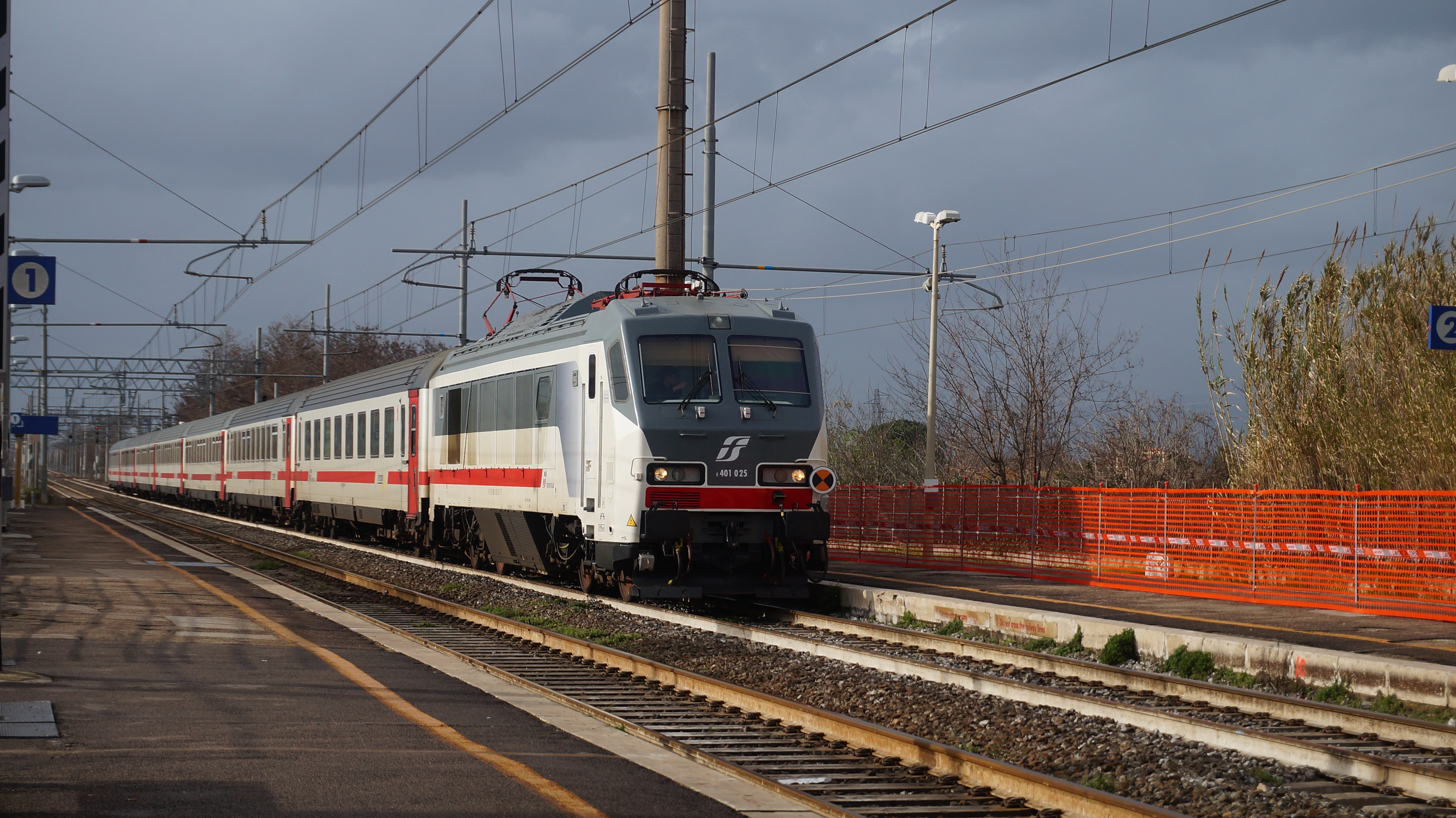 Locomotiva FS E.401.025 al traino del treno InterCity 555 Roma-Reggio Calabria, in arrivo nella stazione di Latina